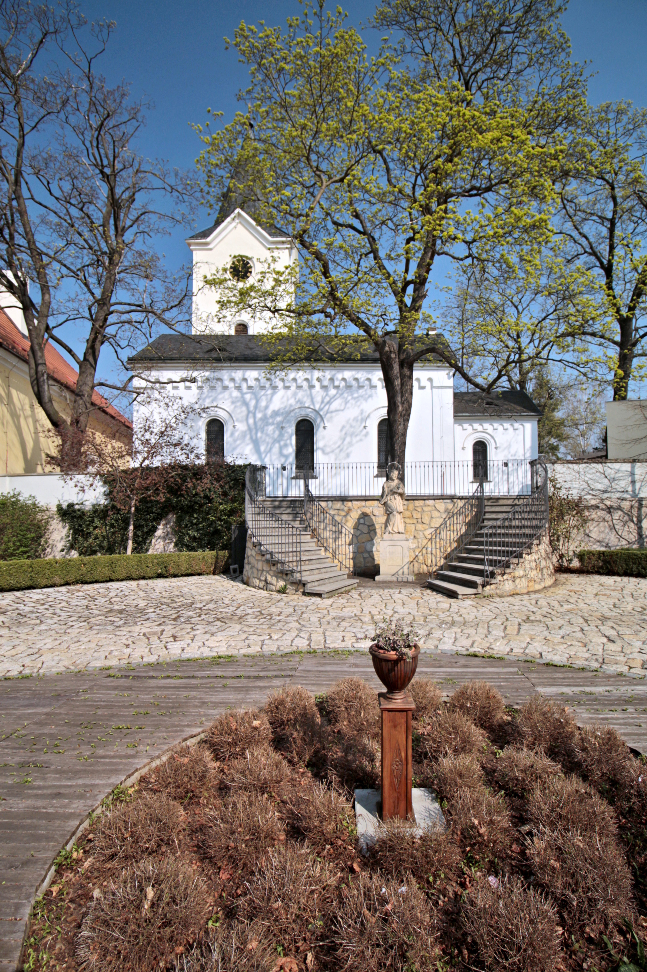 Praha-Dolní Počernice, kostel Nanebevzetí Panny Marie